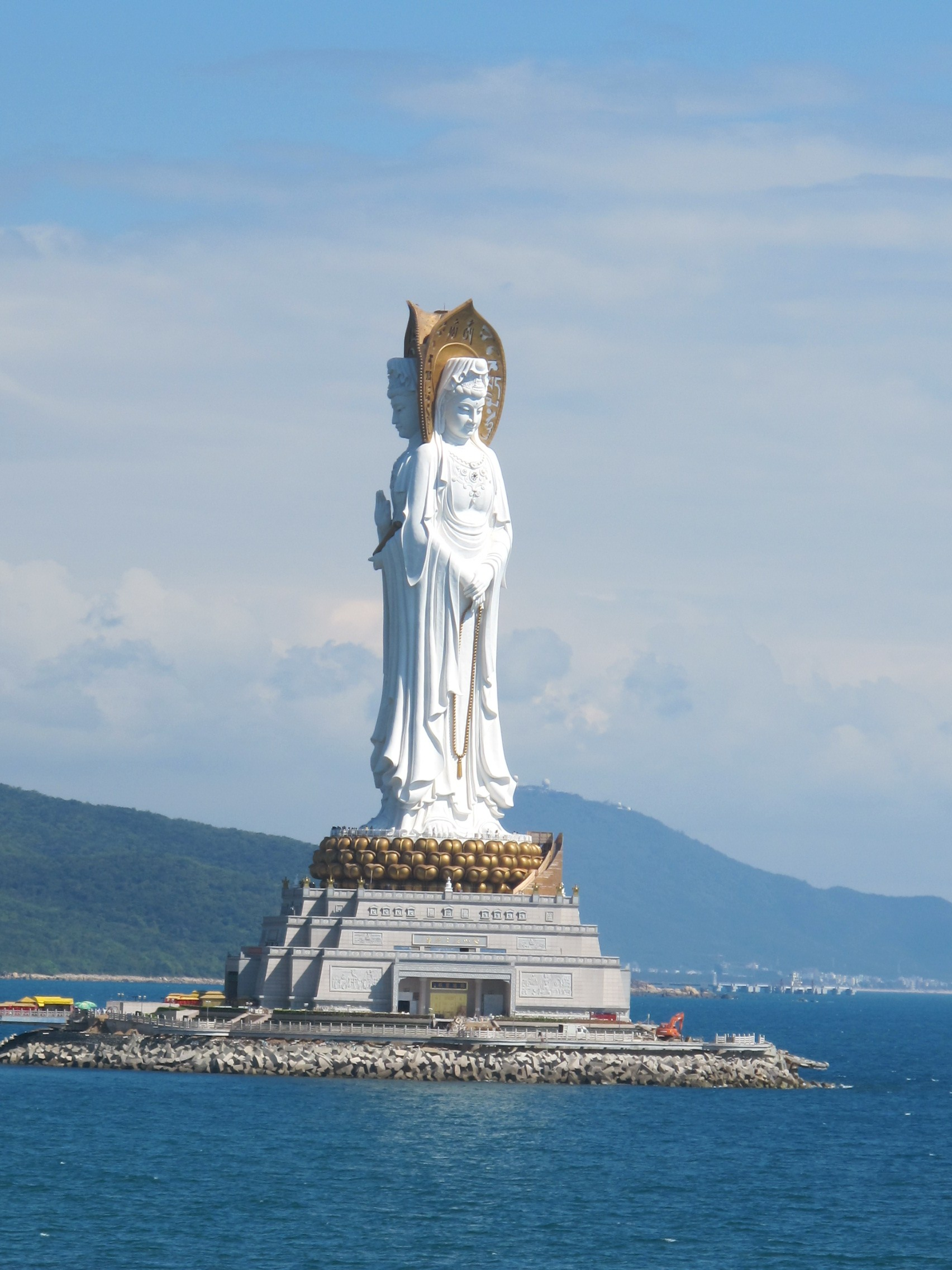 海上观音塑像